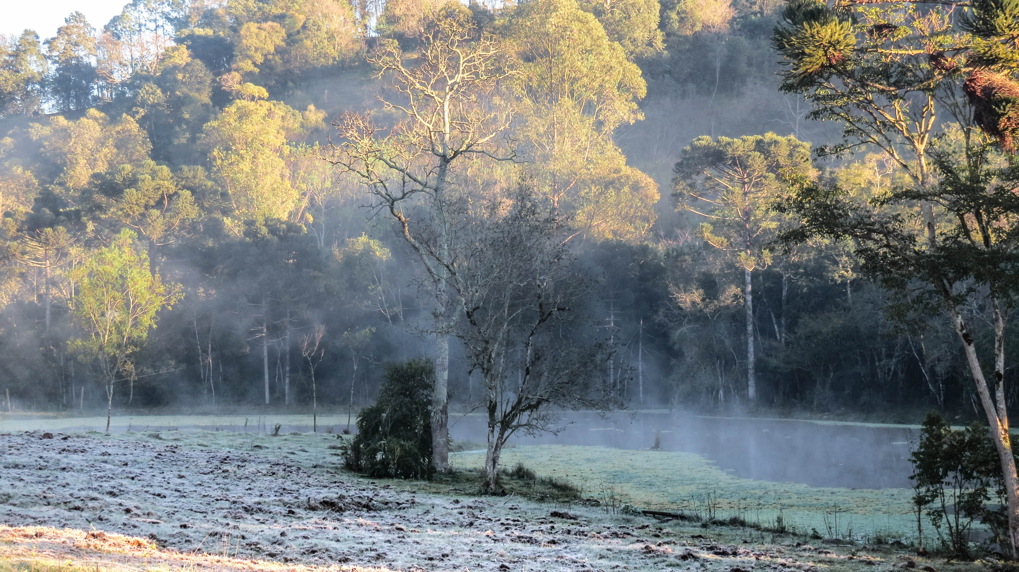 Área rural de Iporã do Oeste com paisagem invernal